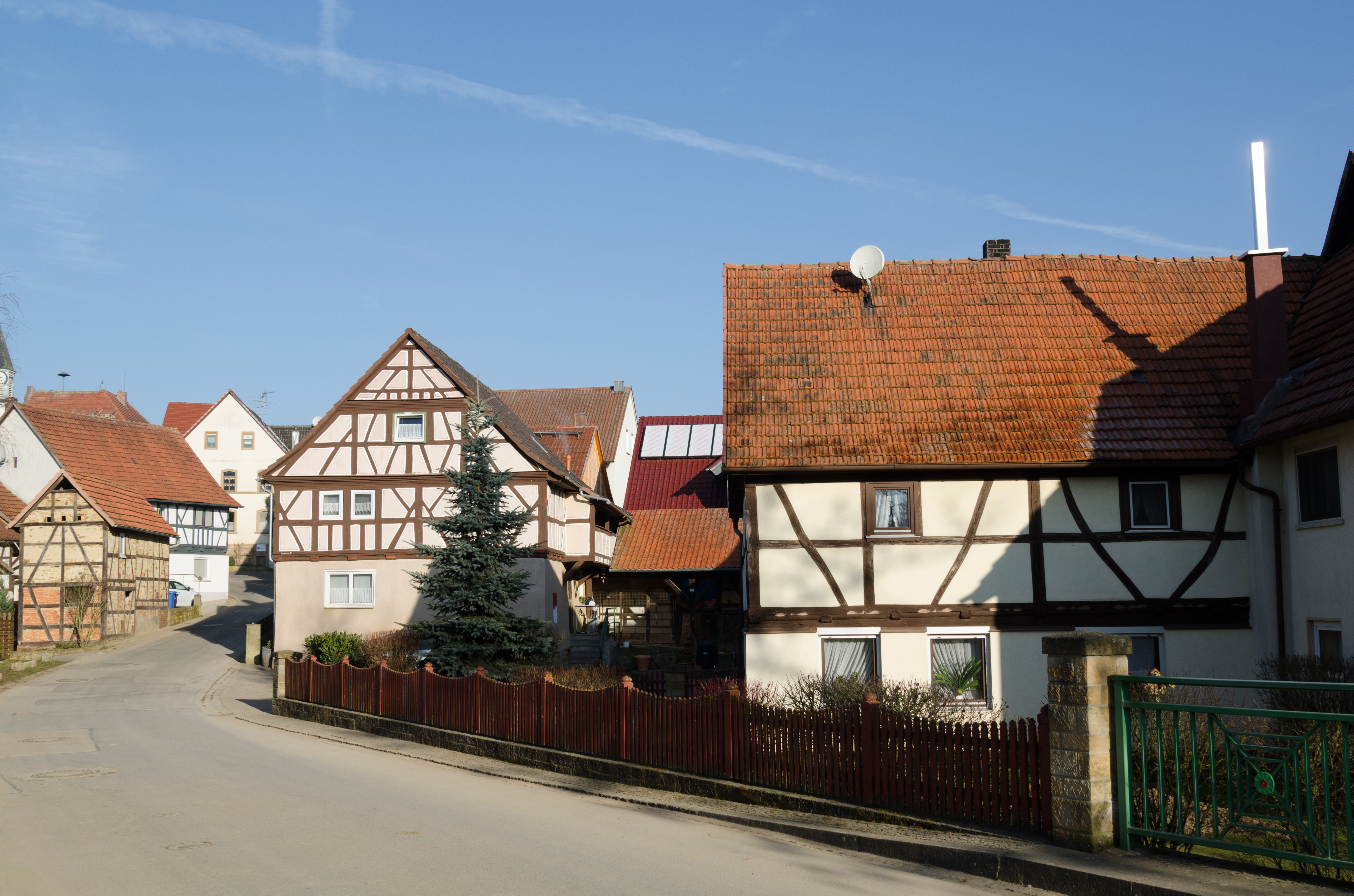 Höchheim, Gollmuthhausen, Lindenweg 7, 9